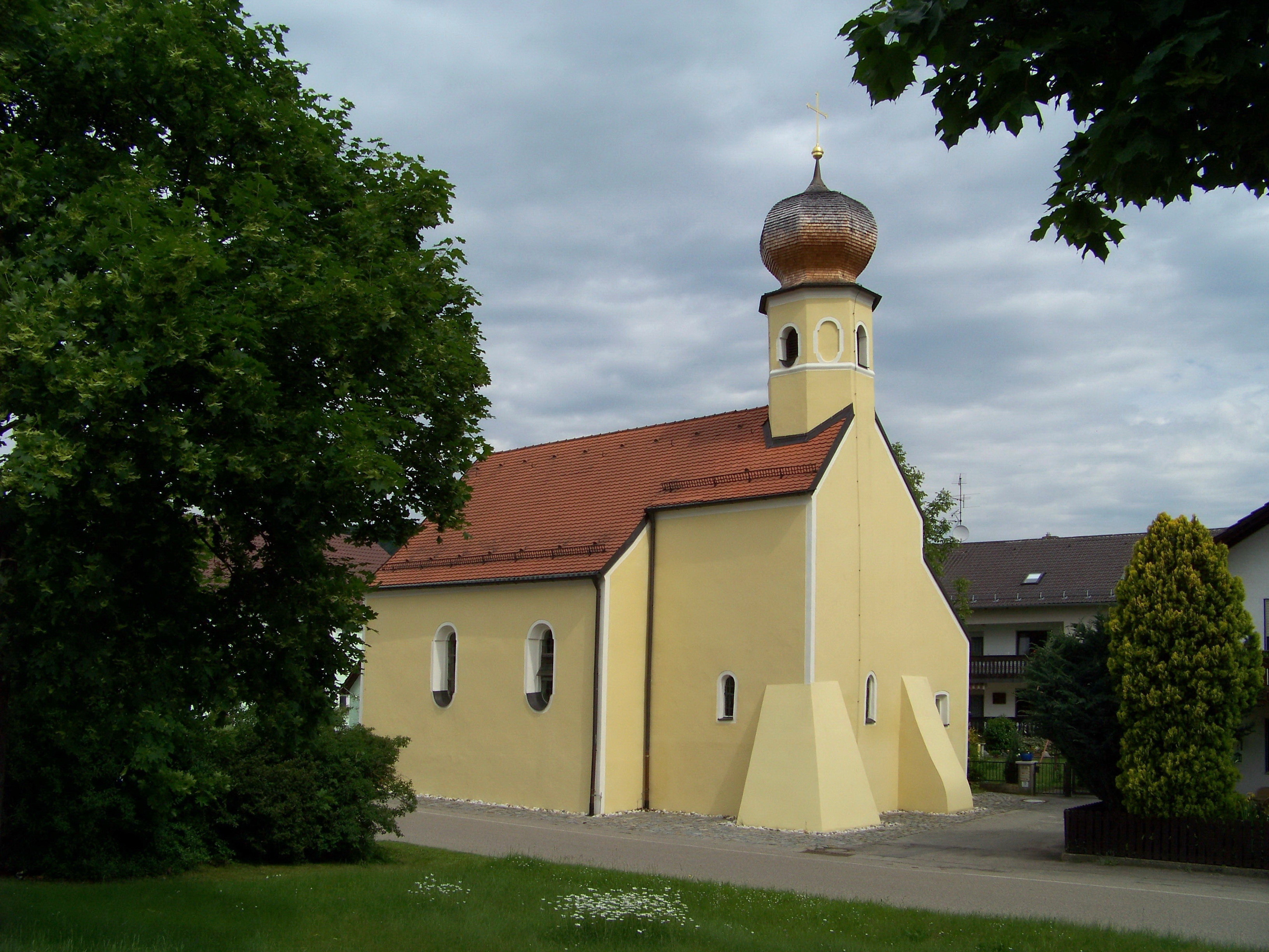 Bach an der Donau. Frengkofen, Donaustraße 12. Katholische Filialkirche St. Bartholomäus, Saalbau mit eingezogenem Chor und Dachreiter mit verschindelter Zwiebelhaube, um 1400, Umgestaltung 17./18. Jahrhundert, mit Hochwassermarke, Gusseisen, bez. 1845.